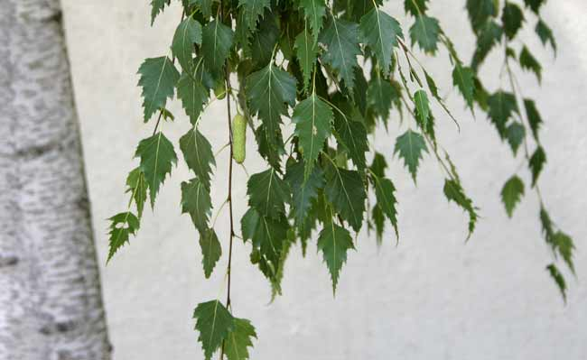 Betula pendula, Silver Birch.